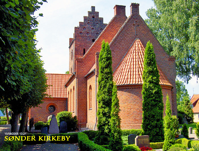 fra øst